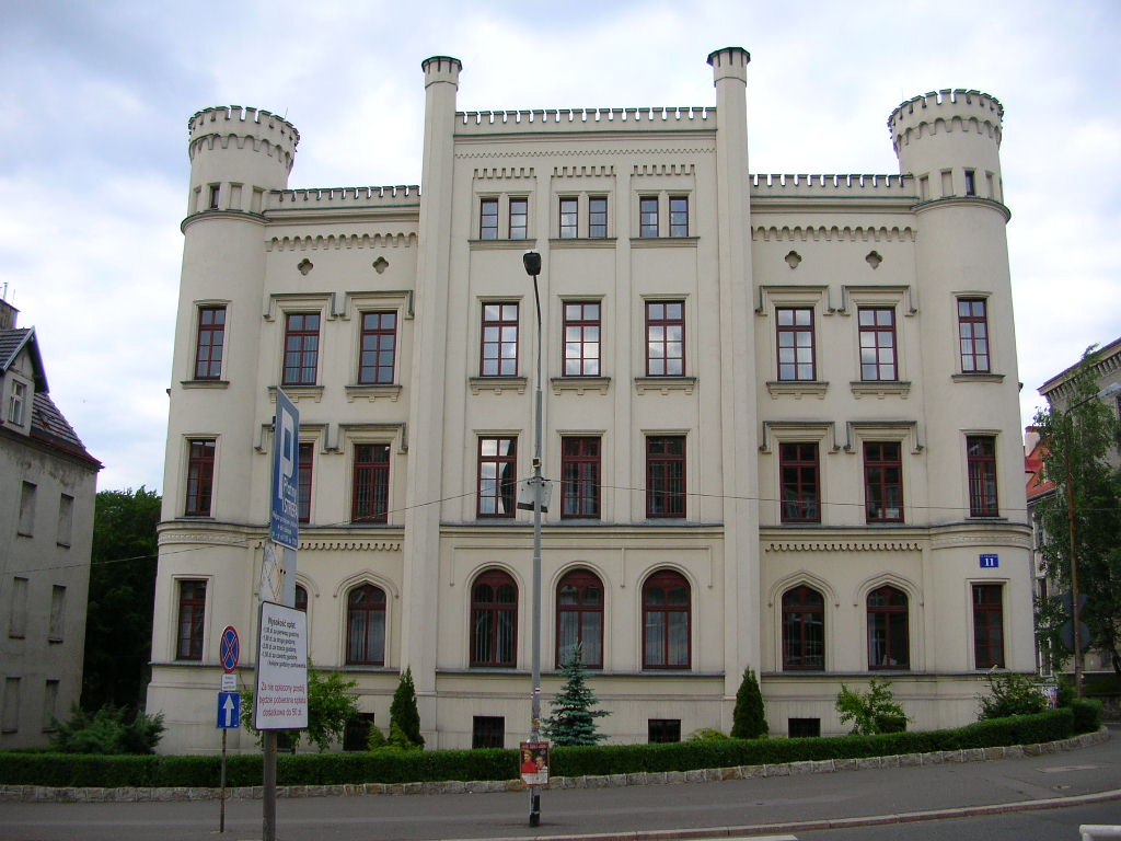 Wałbrzych, ul. Słowackiego 11 - budynek Sądu Rejonowego, 1890. (zabytek nr 660/WŁ z 25.05.1977)